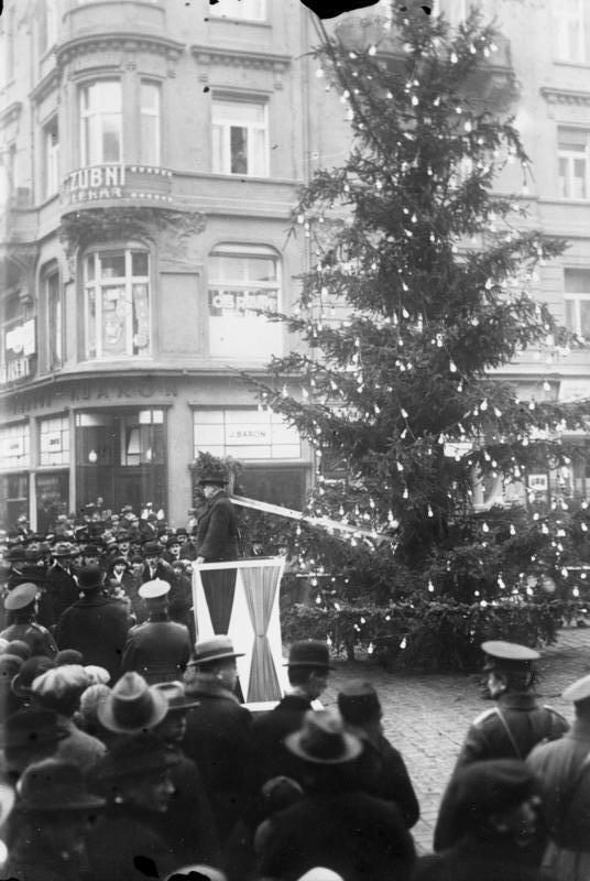 Eine Weihnachtsfeier für Erwerbslose in den Straßen Prags! In Prag veranstaltete man zum Besten der Kinder erwerbsloser Eltern eine Weihnachtsfeier auf der Straße. Ein Redner hält Ansprachen an die Umstehenden, in welchen er an die Opferfreudigkeit des Publikums appelliert